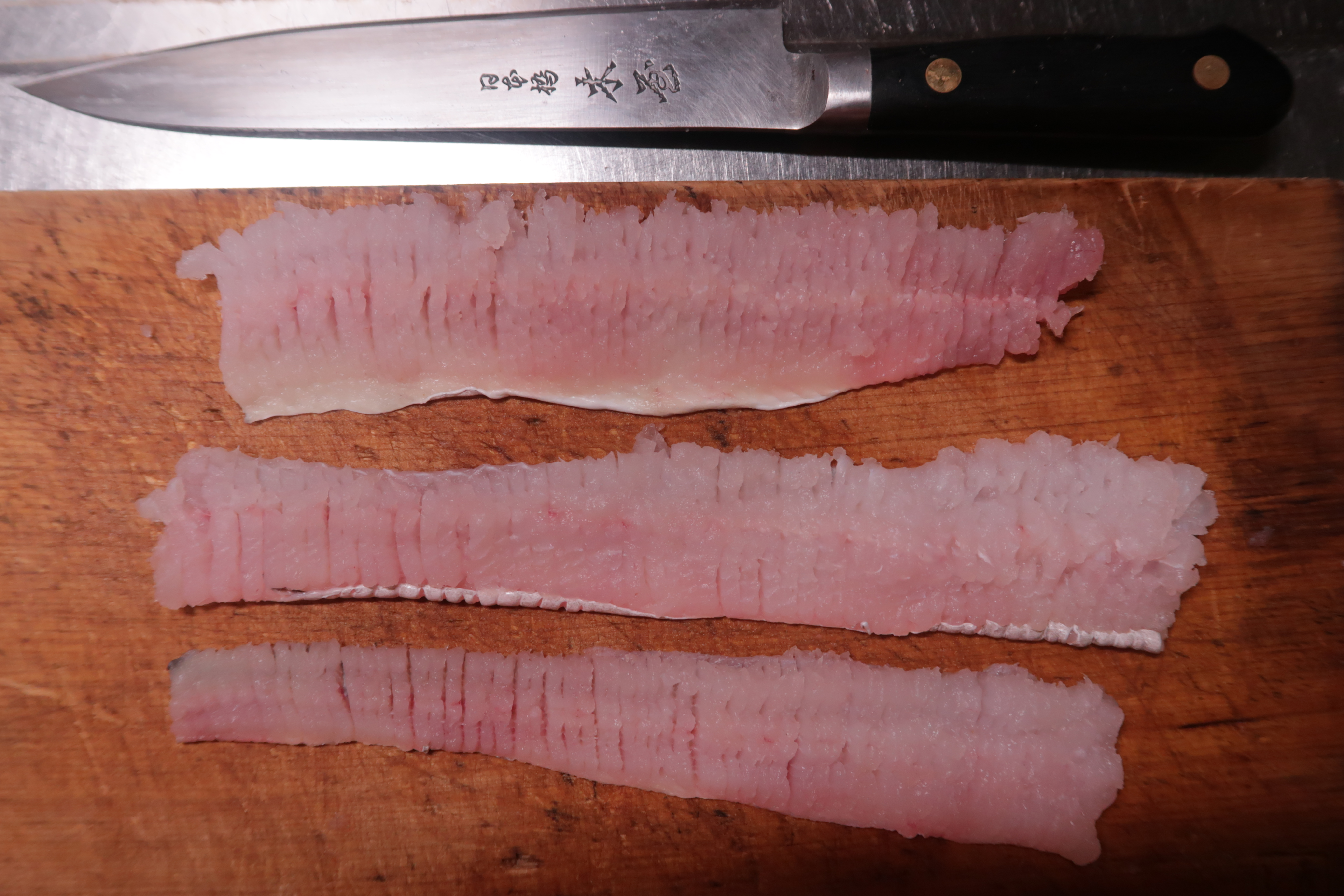 骨切りした鱧